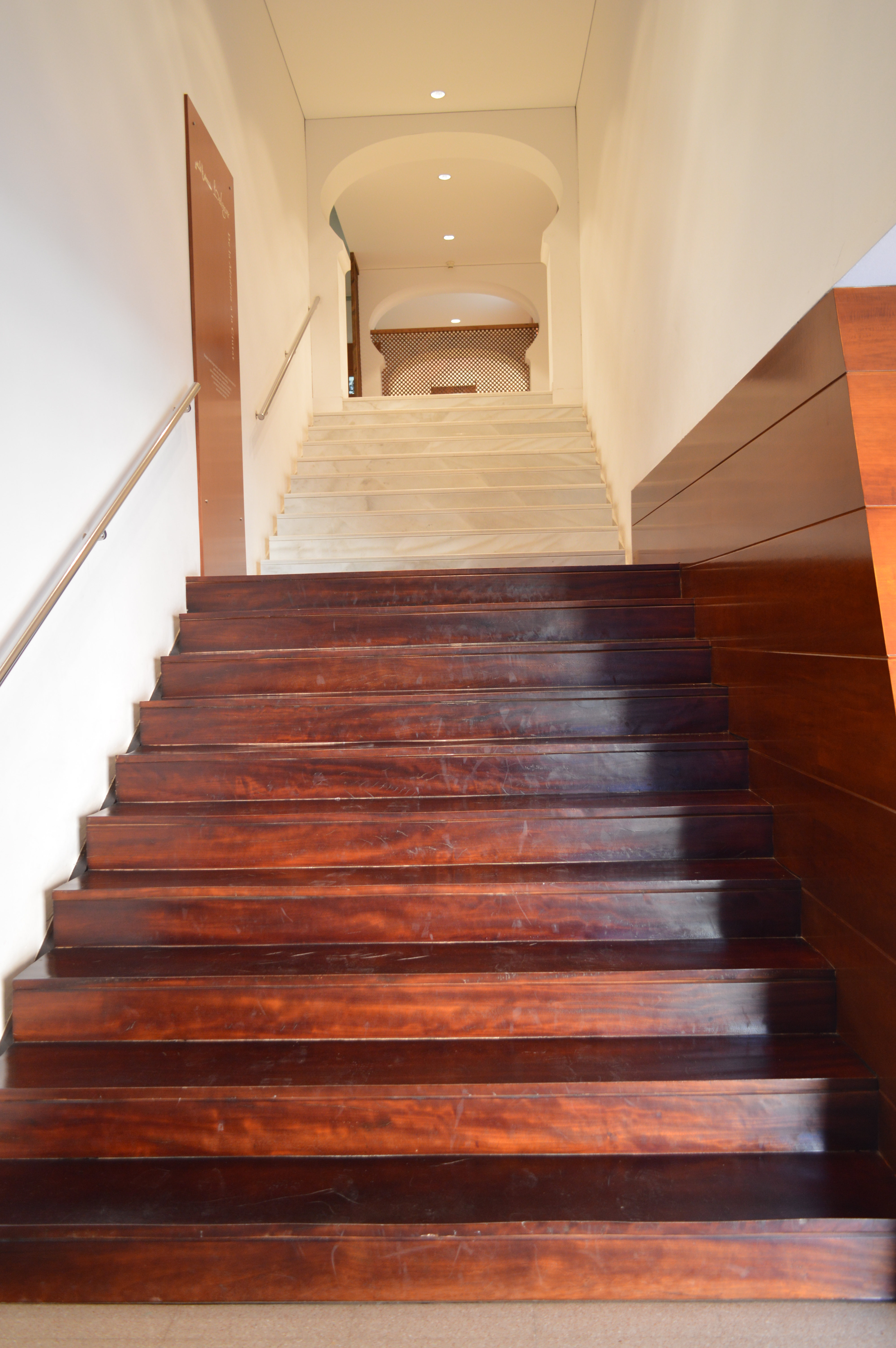 Accès al primer pis